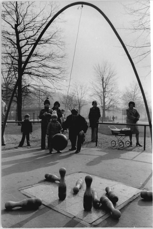 ADN-ZB Koard 2.3.75 Berlin: So kann man "alle neune" werfen- demonstriert der Opa seinem Enkel. Am 2.3. nutzen viele Hauptstädter die Freizeitanlagen im Volkspark Friedrichshain zu einem kleinen Beitrag im "Mach mit - bleib fit".